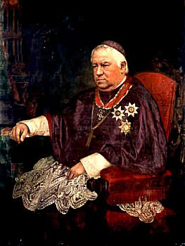 brněnský biskup Antonín Arnošt, hrabě Schaffgotsche, svobodný pán z Kynastu a Greifensteinu